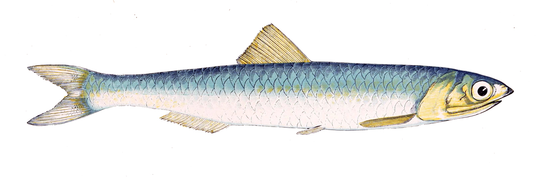 Engraulis encrasicolus